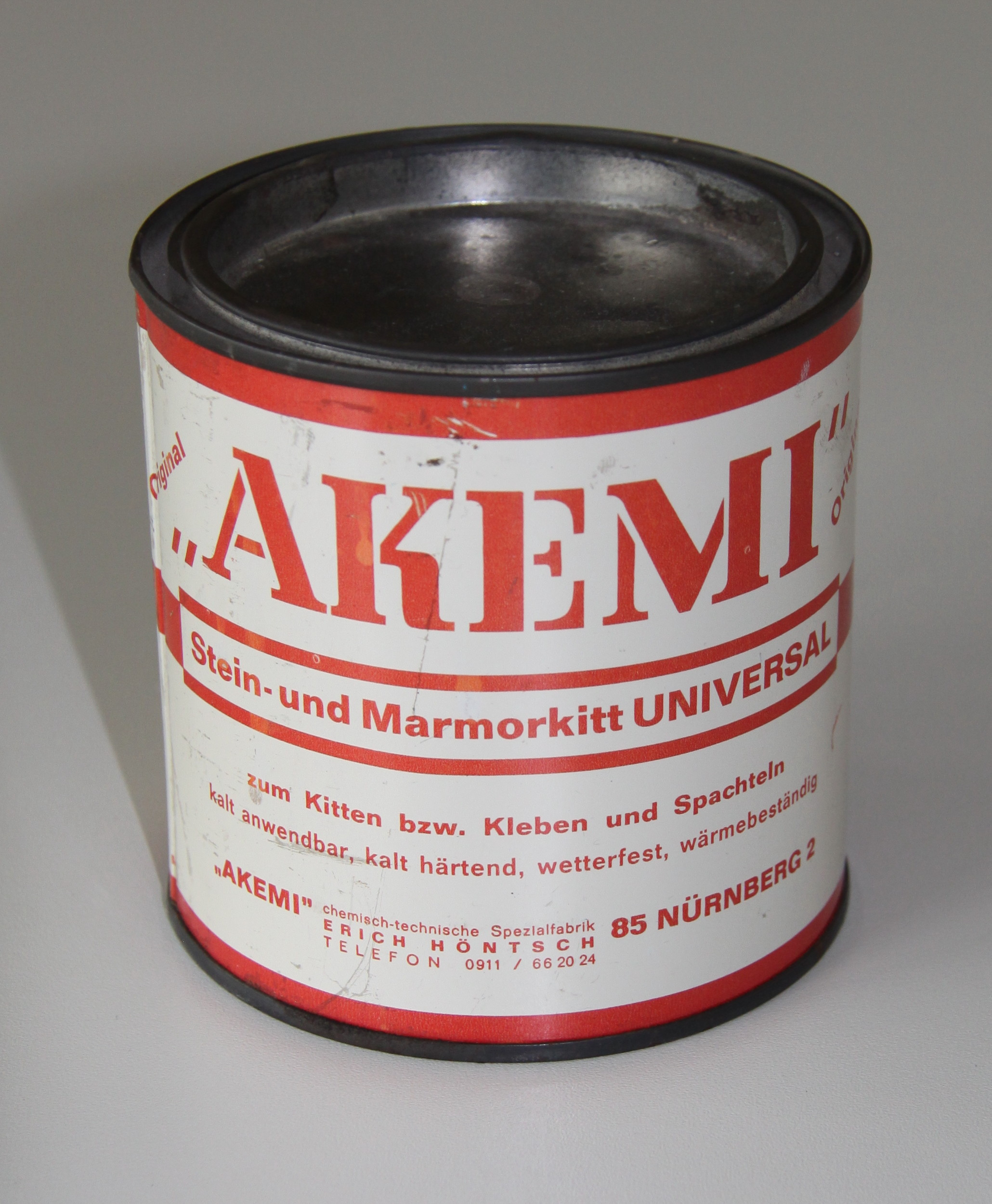 In dieser Dose befindet sich der erste Steinkleber auf Polyesterbasis der Fa. Akemi in Nürnberg